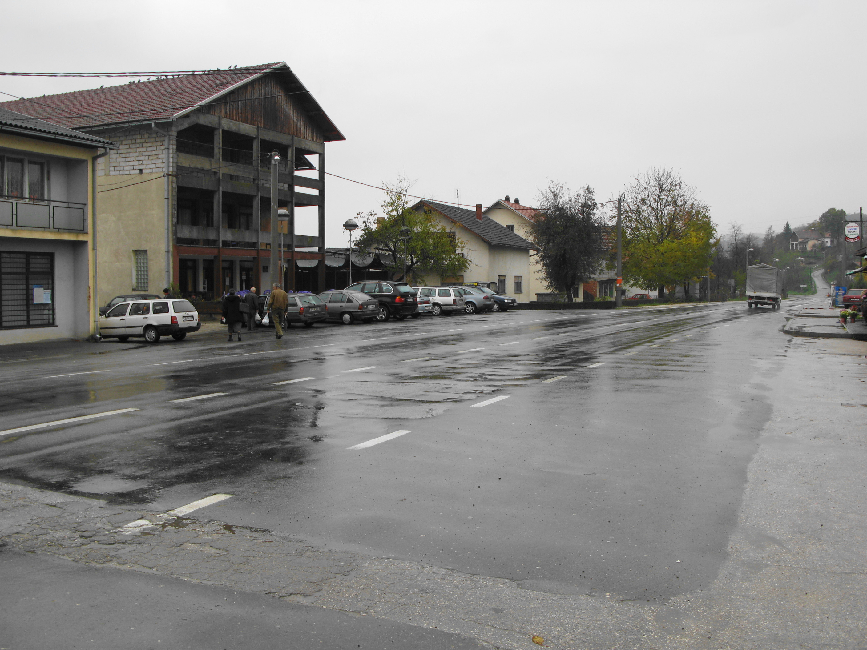 Oštra Luka, Republika Srpska.